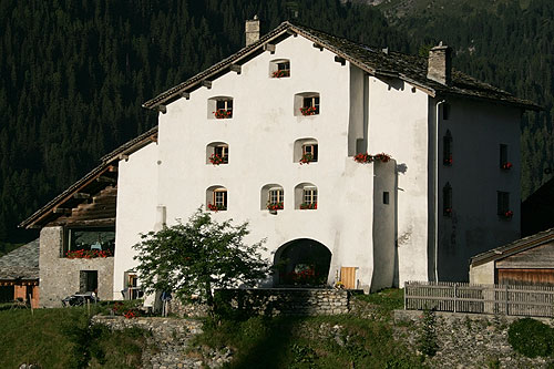 Hotel "Weiss Kreuz" in Splügen